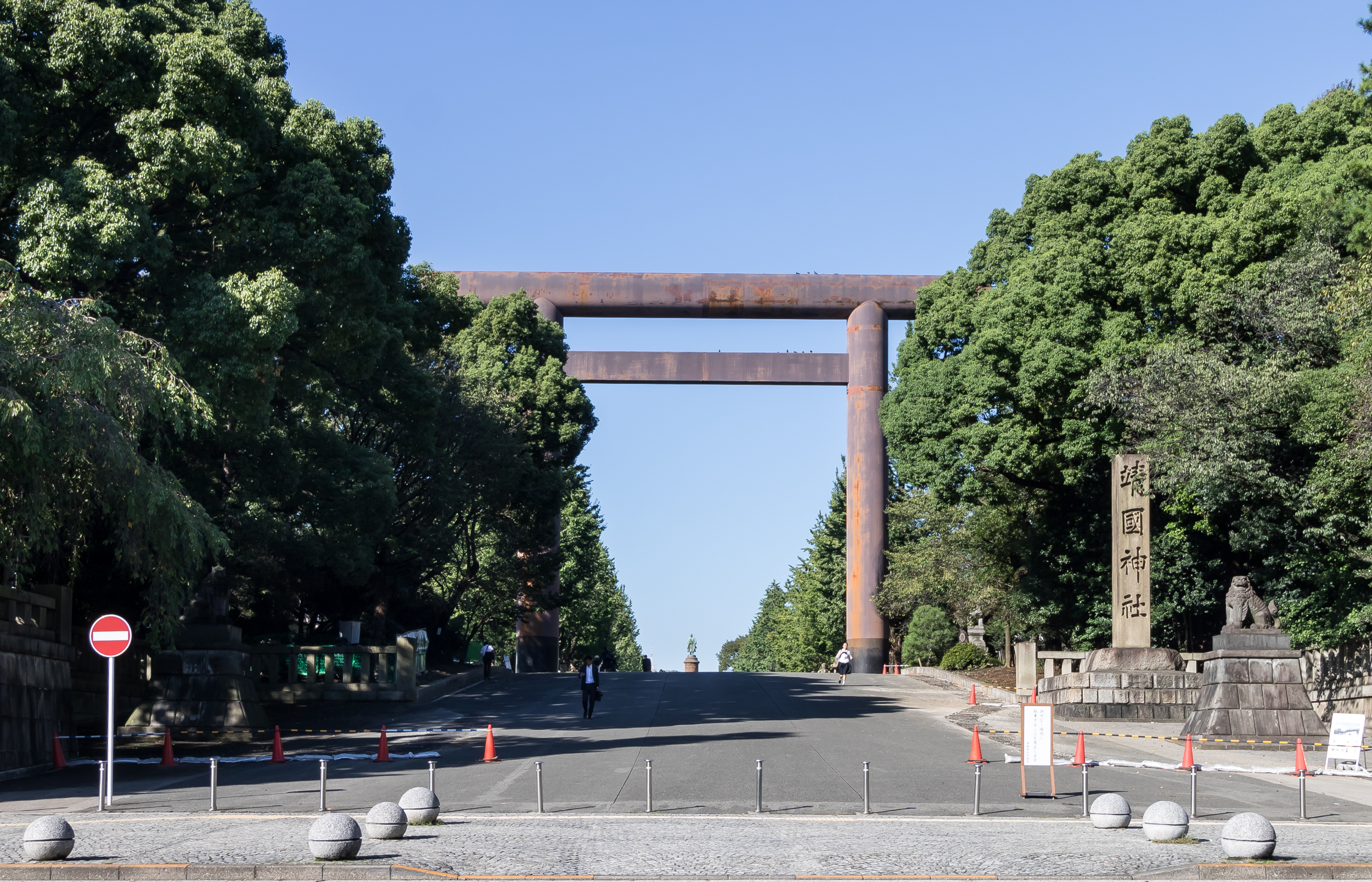 靖国神社、第一鳥居（大鳥居）。